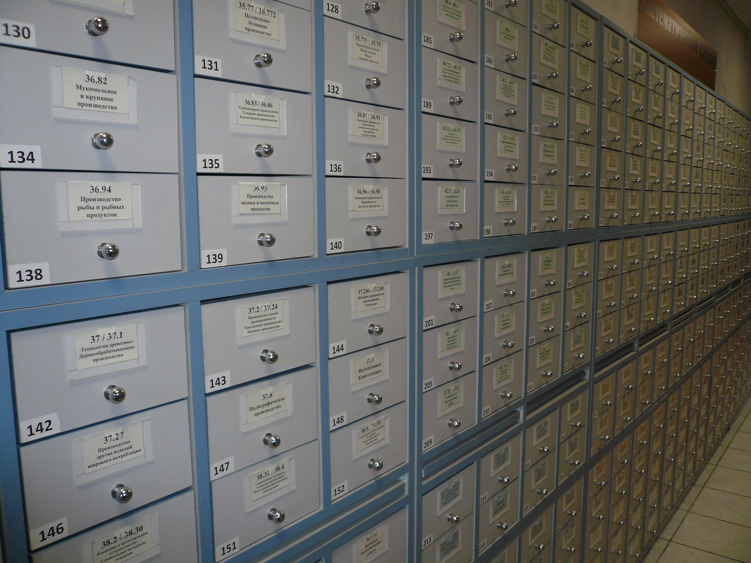 Калининградская областная научная библиотека